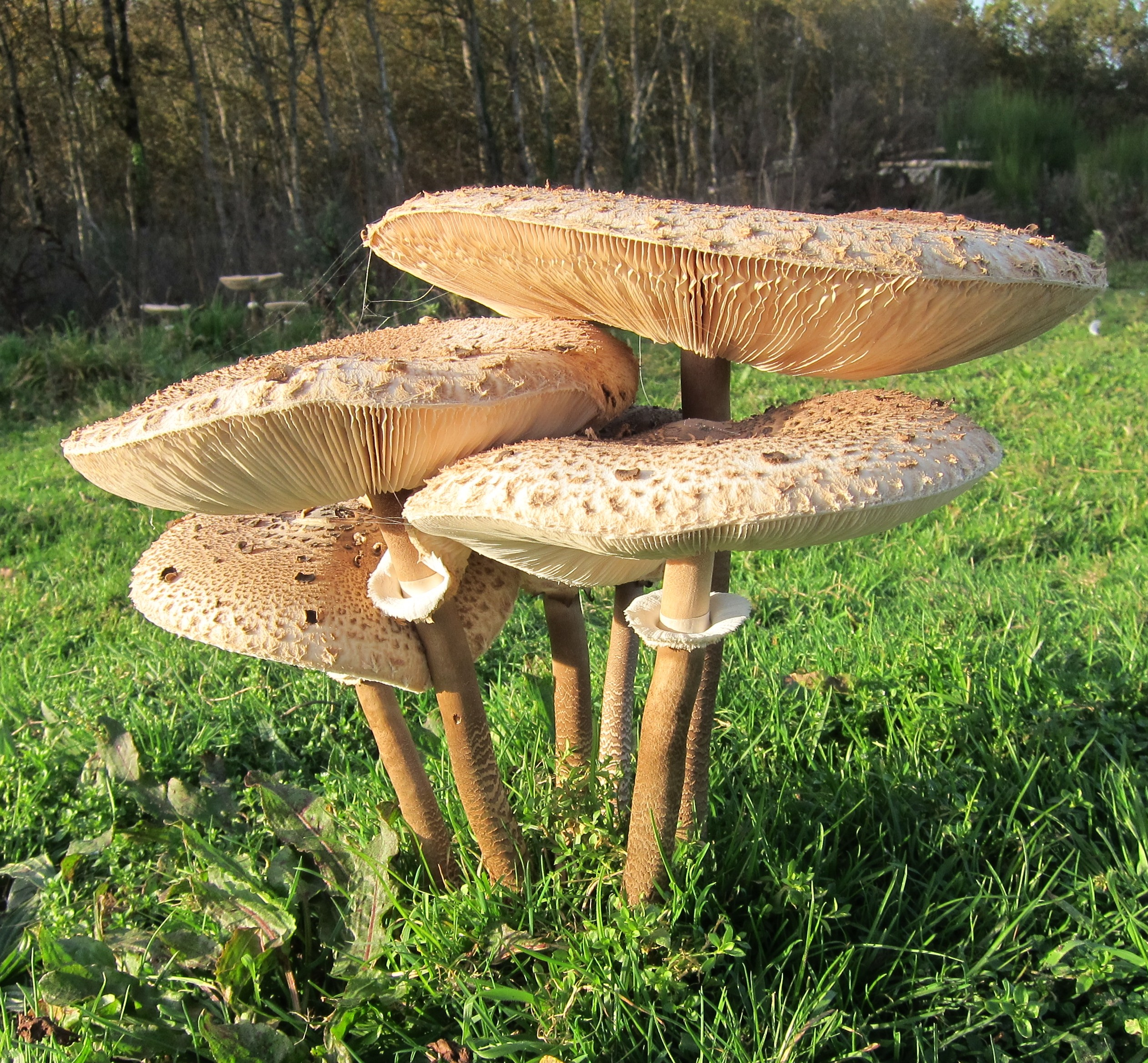 Lépiote élevée, hauteur 30 cm, variété comestible en phase de reproduction, novembre 2011, lieu : Millançay en Sologne département du Loir & Cher